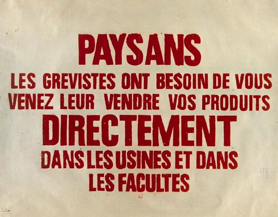 "Paysans, les grévistes ont besoin de vous. Venez leur vendre des produits directement dans les usines et dans les facultés" - Affiche Mai 38 - 97 x 76 cm - Sans tampon - Source BNF.